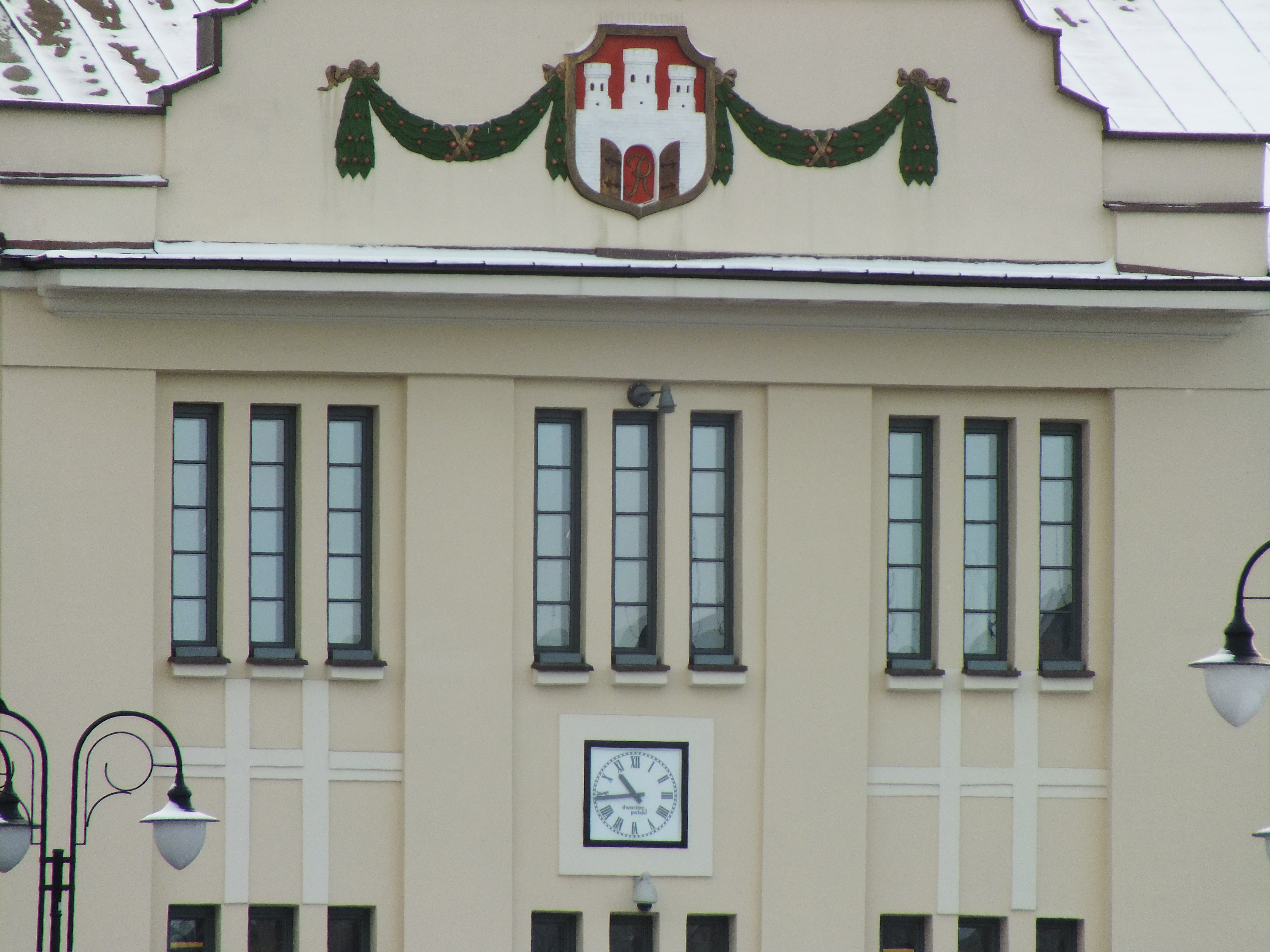 Radom, dworzec kolejowy, 1884-1885